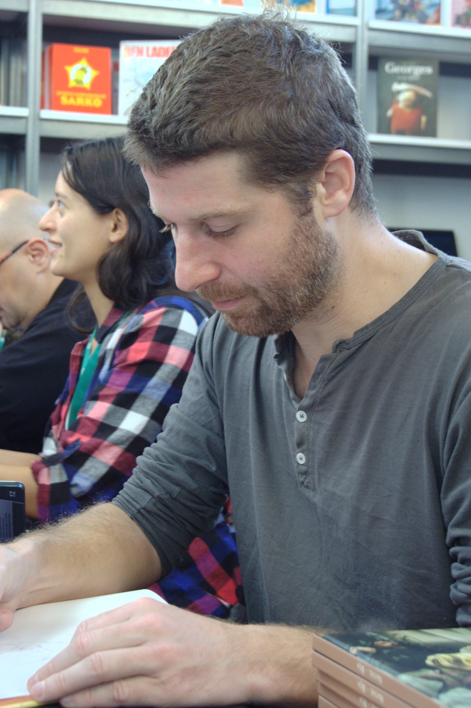 Fabien Bedouel lors de Quai des Bulles à Saint-Malo le 27 octobre 2012.